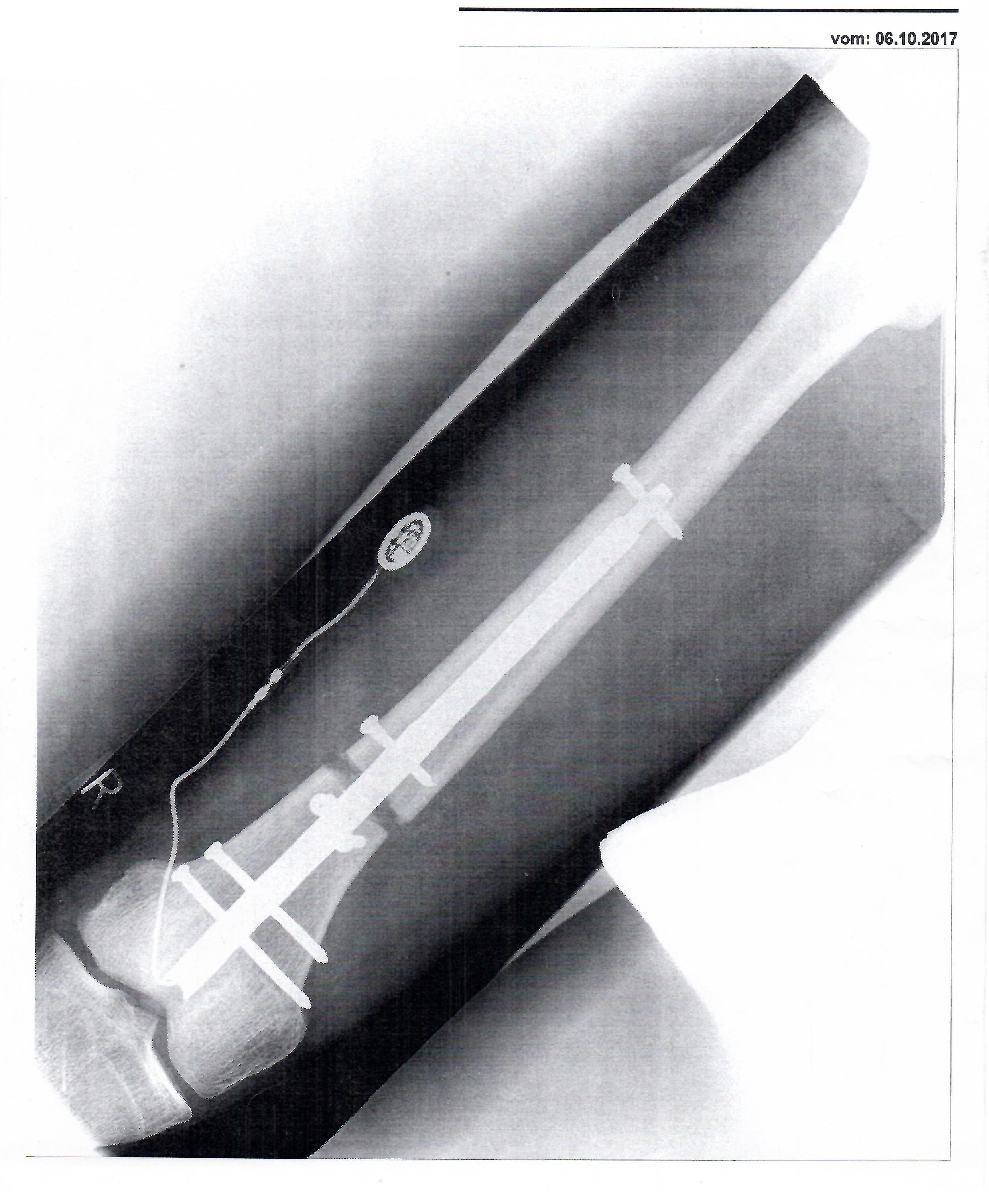 Die Röntgenaufnahme zeigt einen eingebauten Fitbone Distraktionsmarknagel in einem Oberschenkelknochen kurzer Zeit nach der Operation